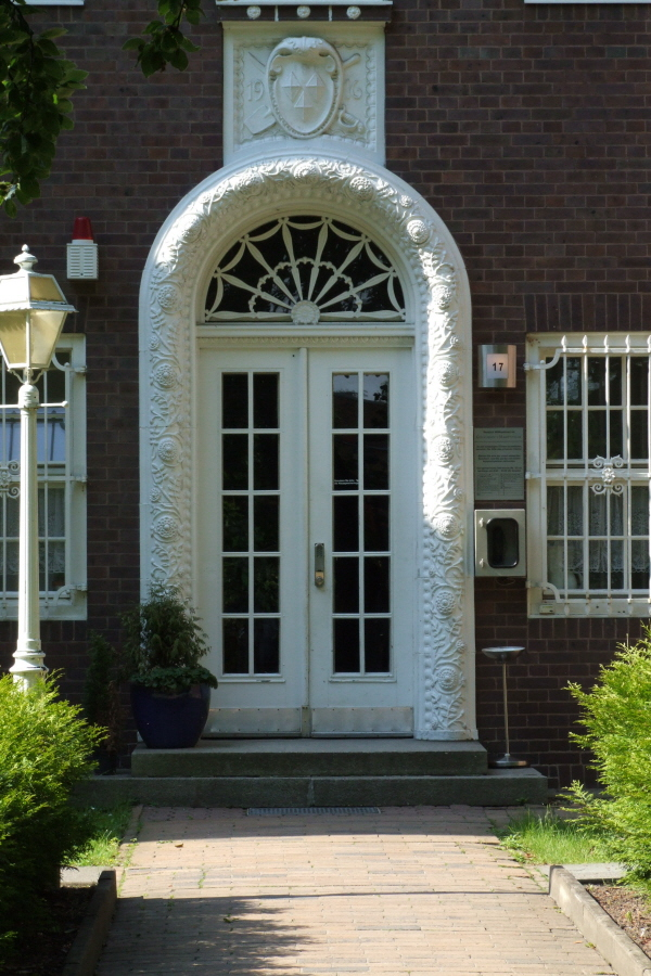 Villa Schippert von Bruno Möhring in der Emilienstrasse 17 in Berlin-Marienfelde Fotograf: Harald Rossa Datum: Juni 2006